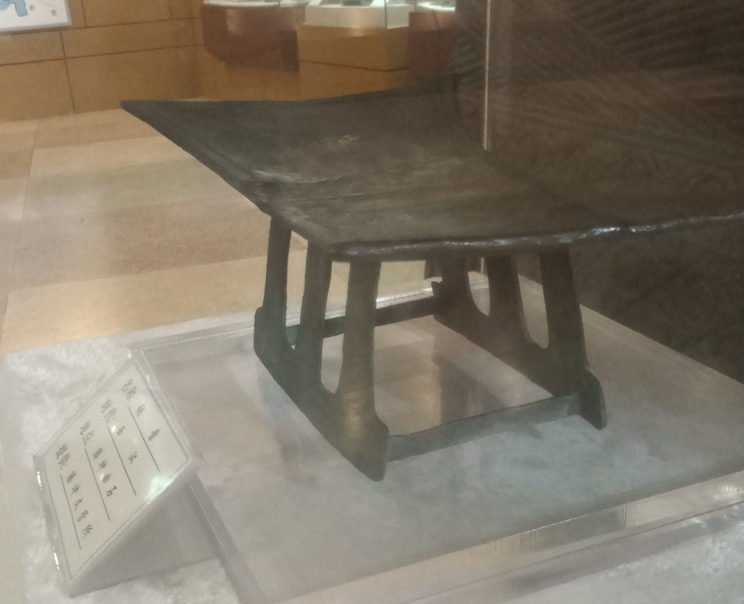 中文（中国大陆）: 保山市博物馆-西汉-腾冲曲石-铜案